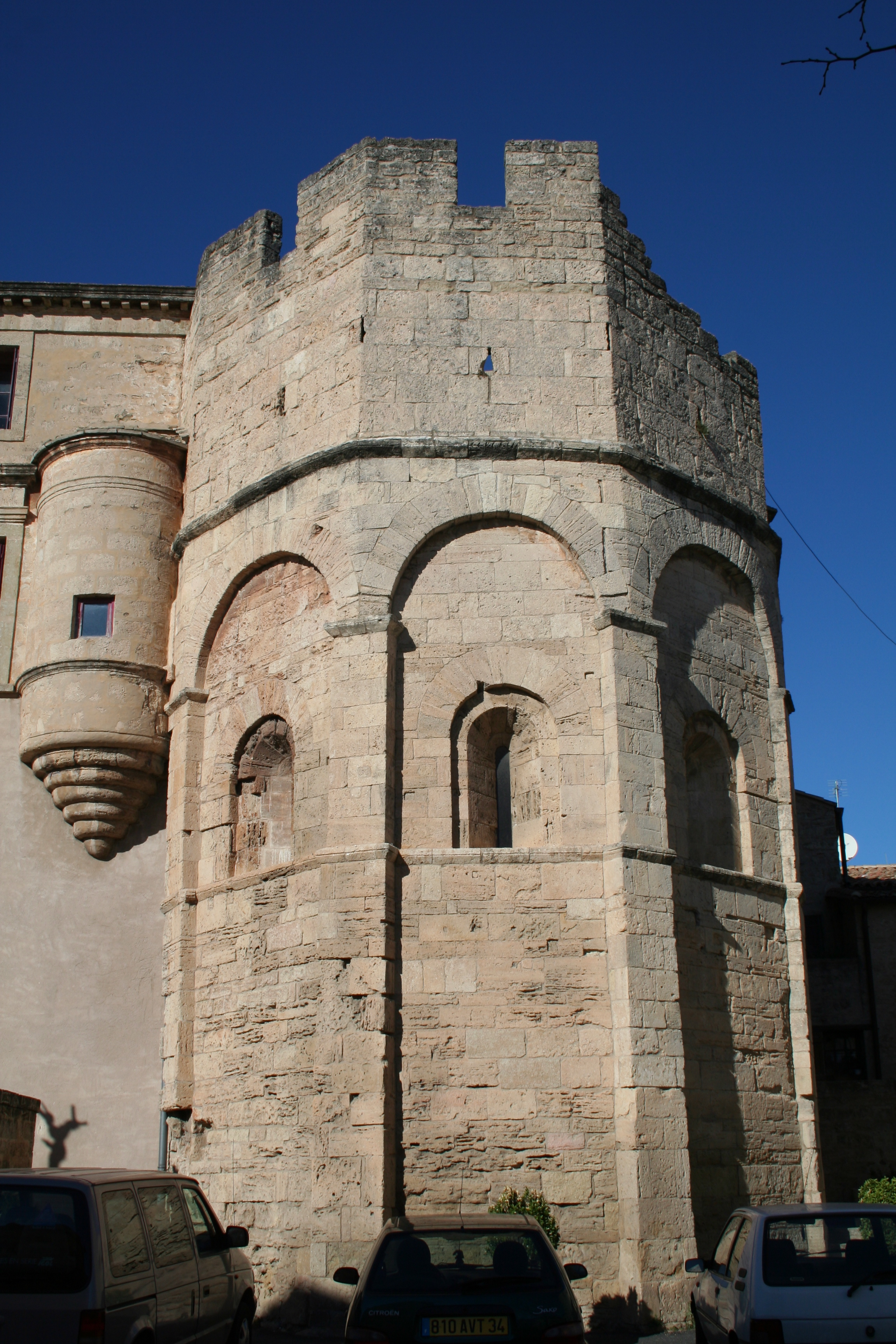 Loupian (Hérault) - chevet de l'église Saint-Hyppolite.